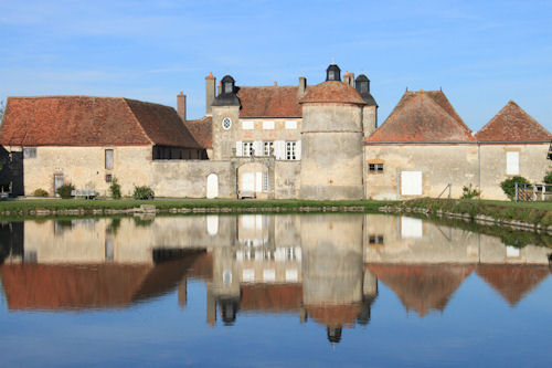 Marigny (03) Château de Charmes